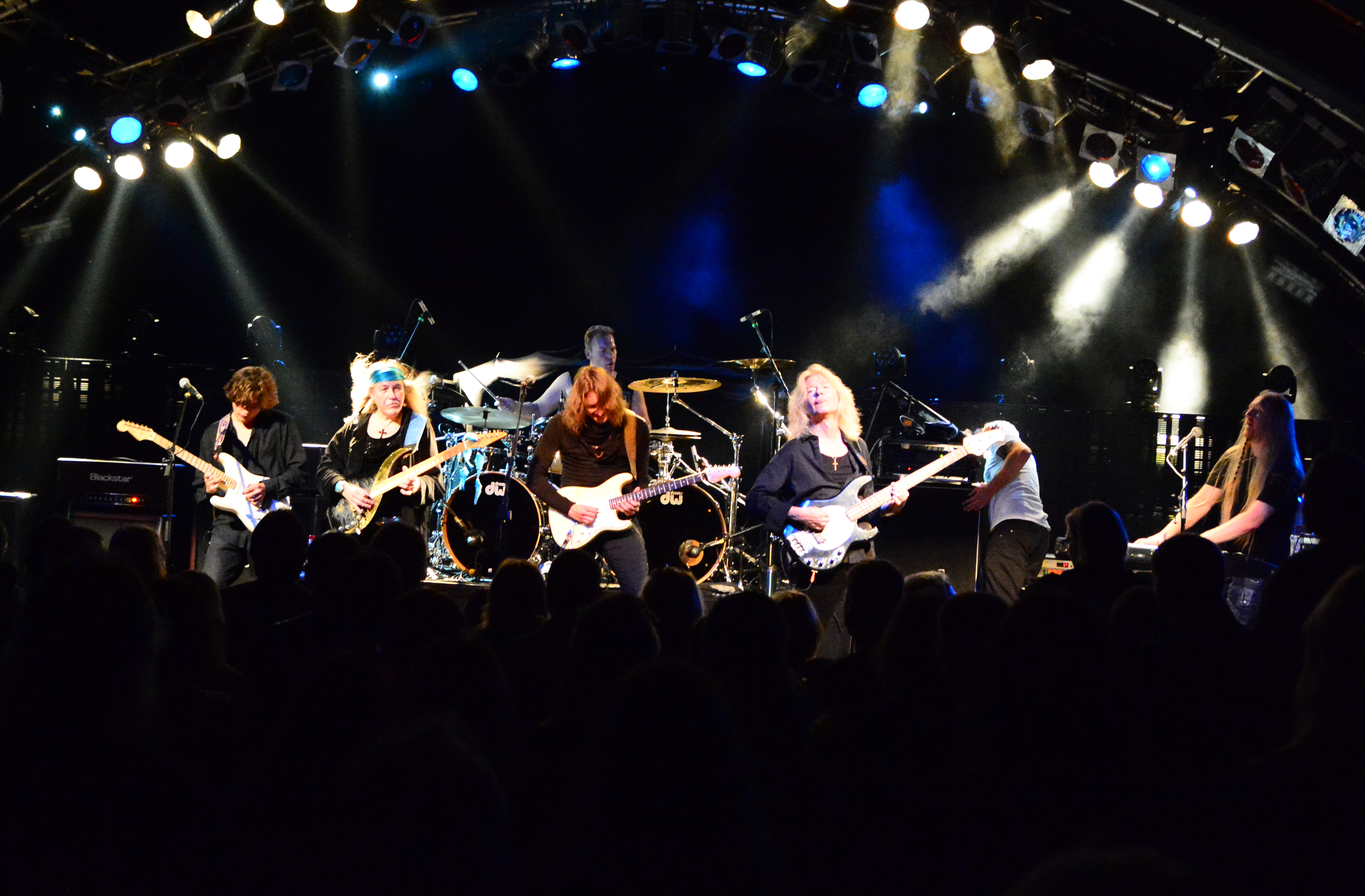 Uli Jon Roth & Band bei den Hamburg Metal Dayz 2015